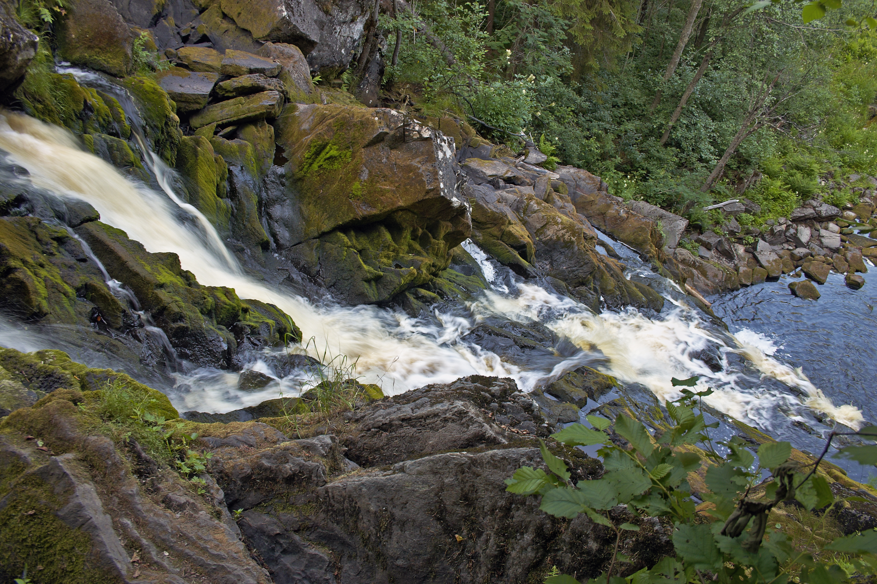 Белые мосты, Питкярантский район This image is related to the protected area of Russia number 1010142